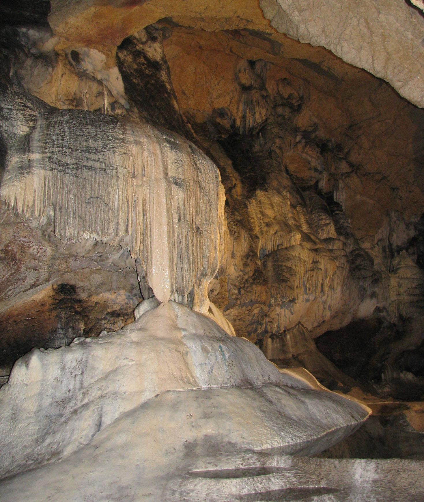 Lazareva pećina cave near village Zlot, Bor community, Serbia